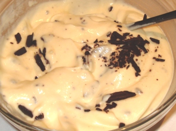 Eine Schale mit Herrencreme